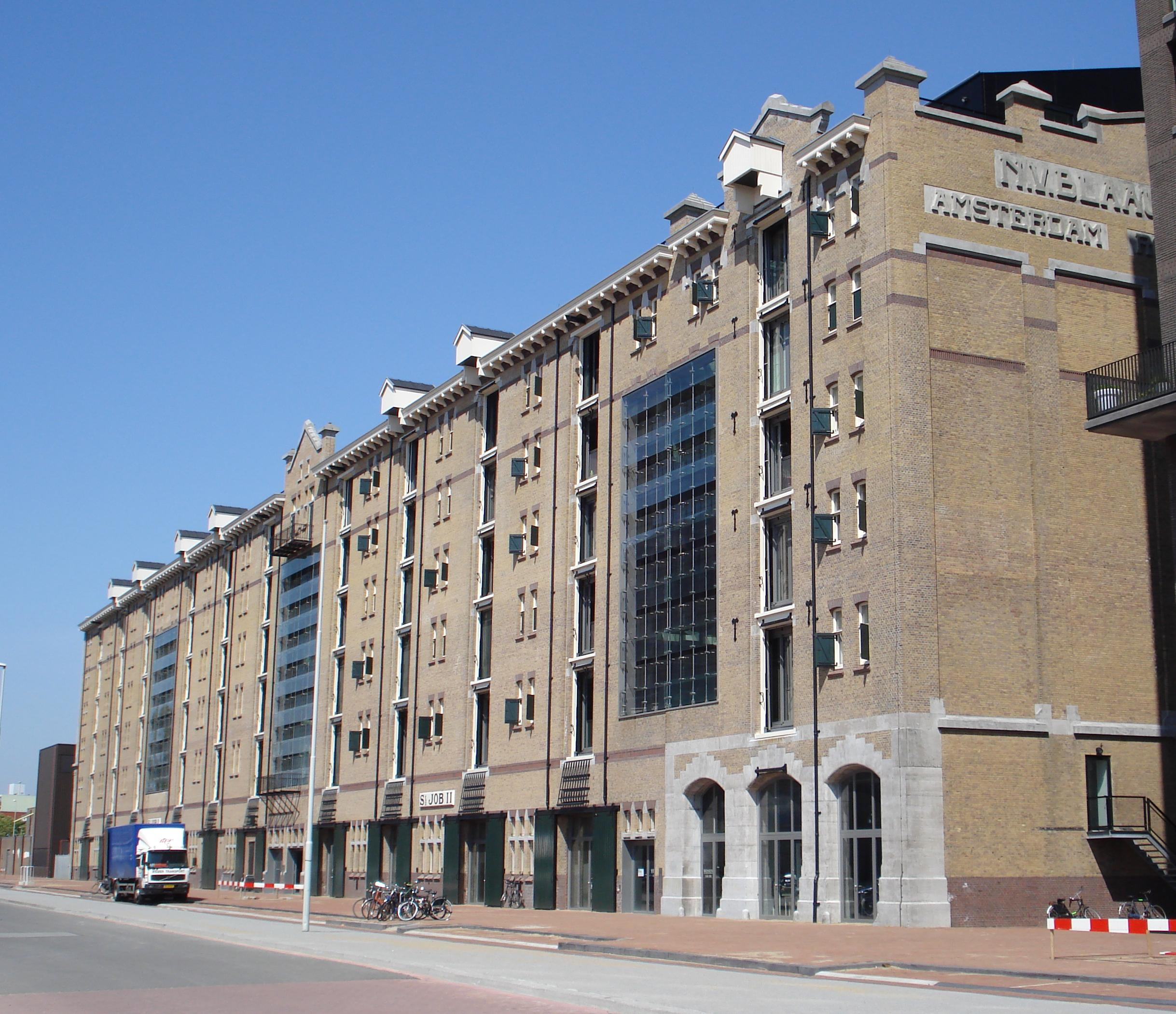 Rotterdam, Lloydstraat 22-198, voormalig pakhuis. Rijksmonument.